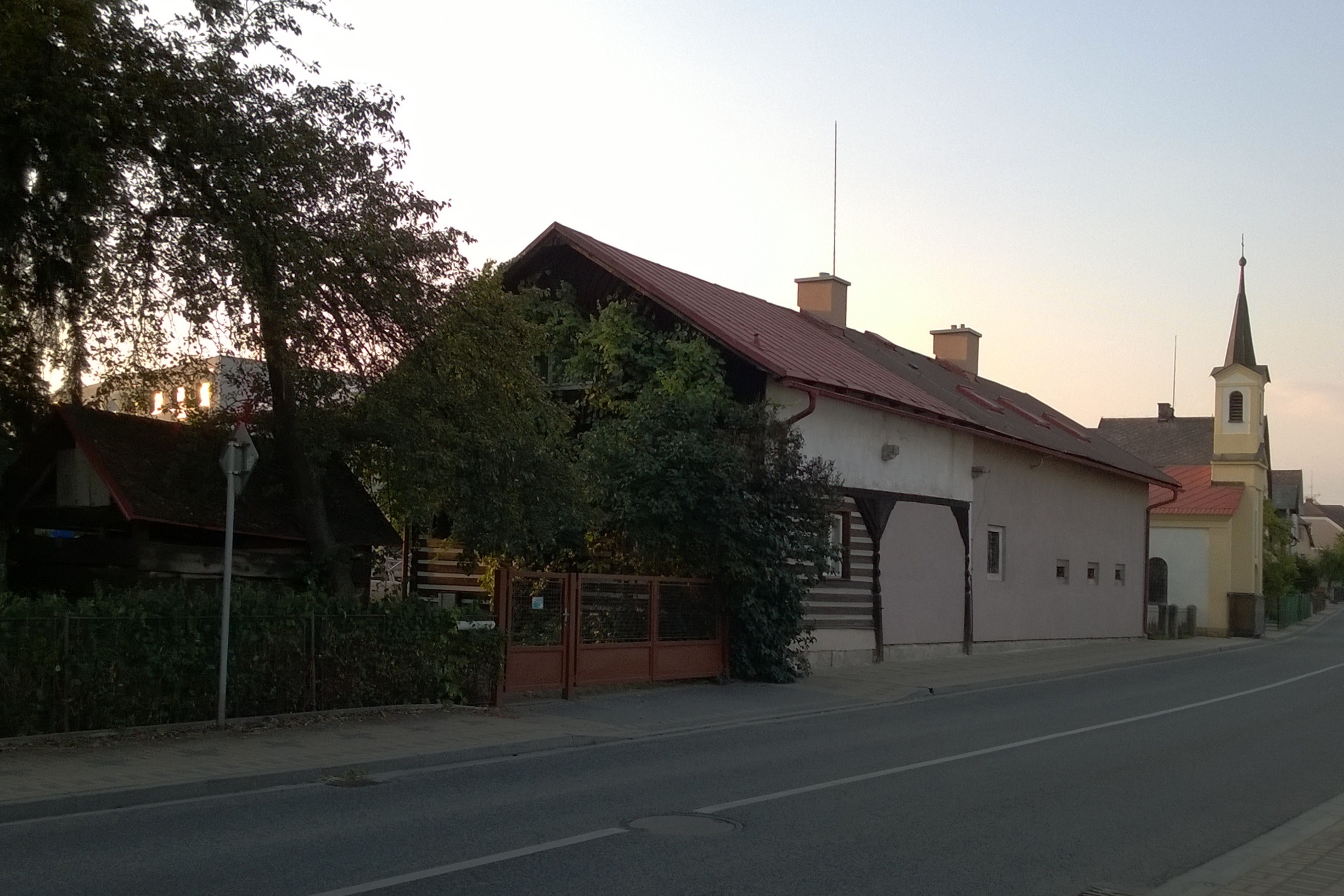 Daliměřice čp. 18, rodný dům pozdějšího politika Jan M. Černého. Černého synovec byl Josef Pekař, který zde prožil velkou část svého mládí. Na Černého i Pekaře upozorňují pamětní desky (umístěné v roubené části za plotem, viditelné z ulice).